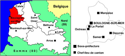 Carte de l'arrondissement de Boulogne-sur-Mer (62) avec chefs-lieux de cantons Utilisateur:Manchot sanguinaire